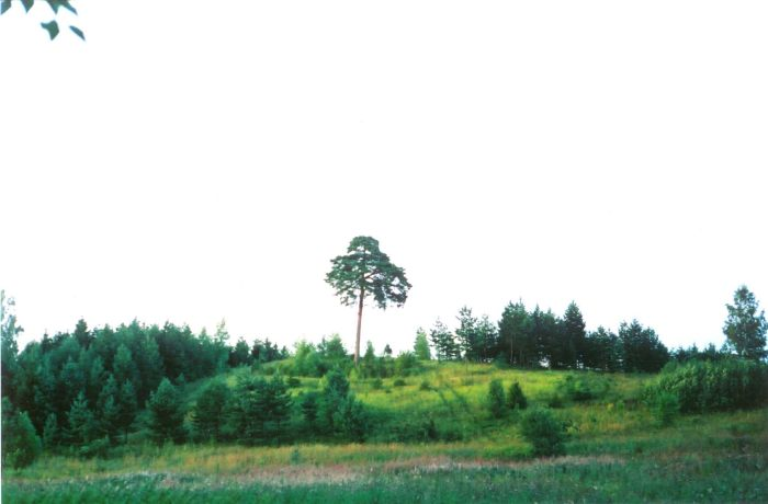 Jaanimäe mänd